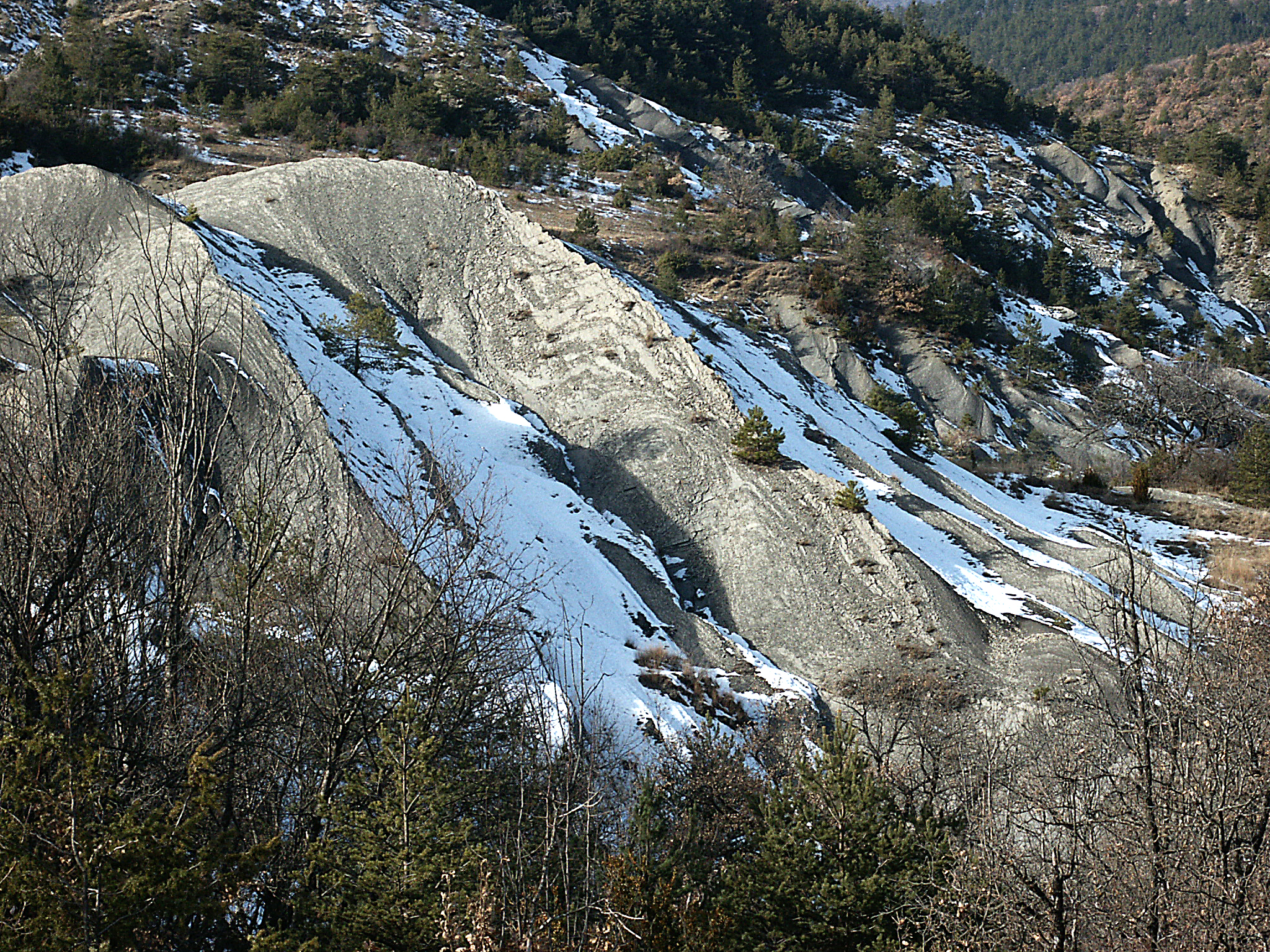 Photo de robines, dans les Alpes Photo perso, licence libre